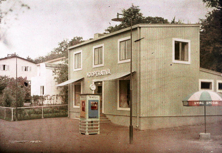 Konsumbutik på Stockholmsutställningen 1930, arkitekt Eskil Sundahl